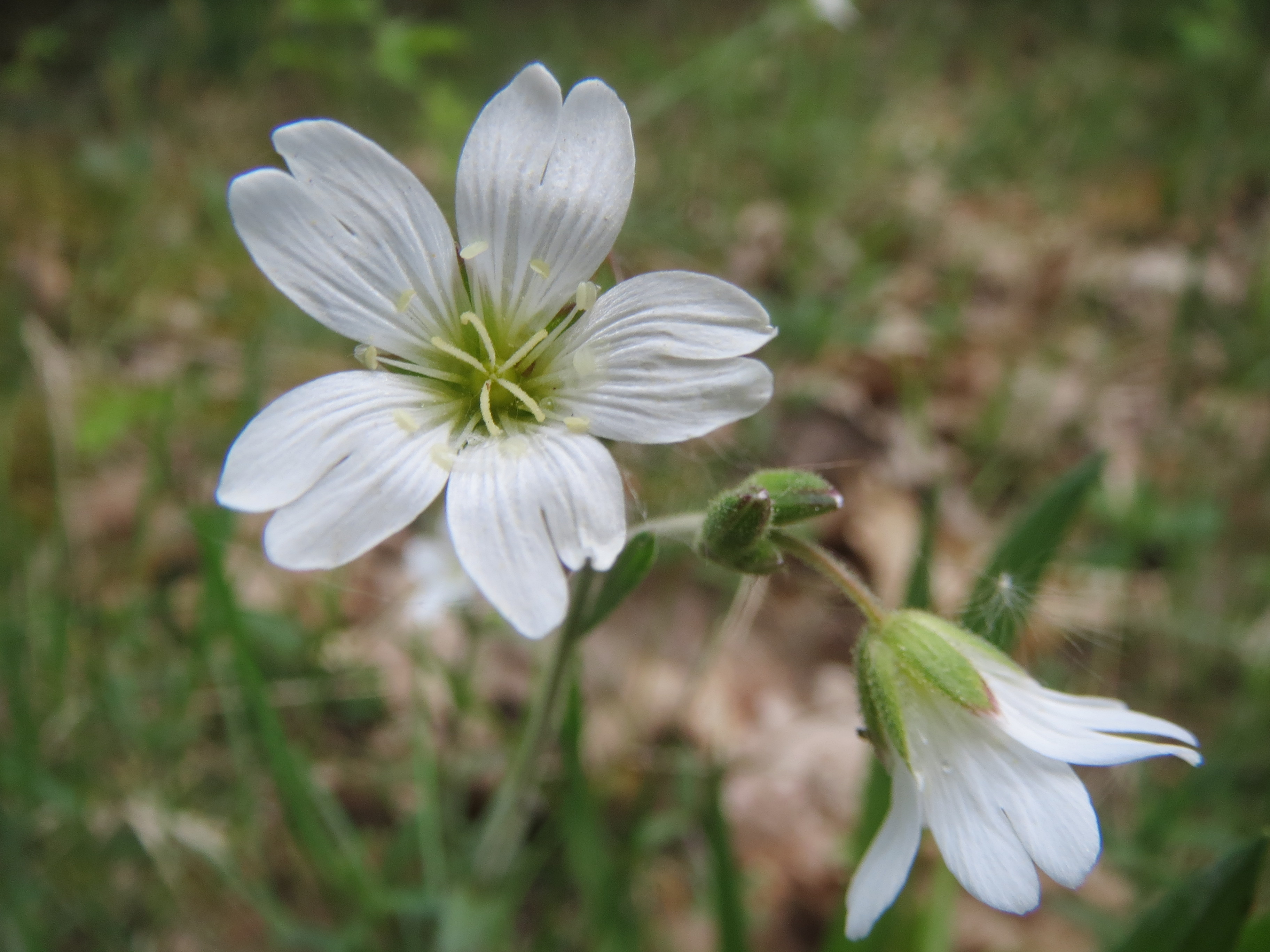 Acker-Hornkraut (Cerastium arvense) im Schwetzinger Hardt